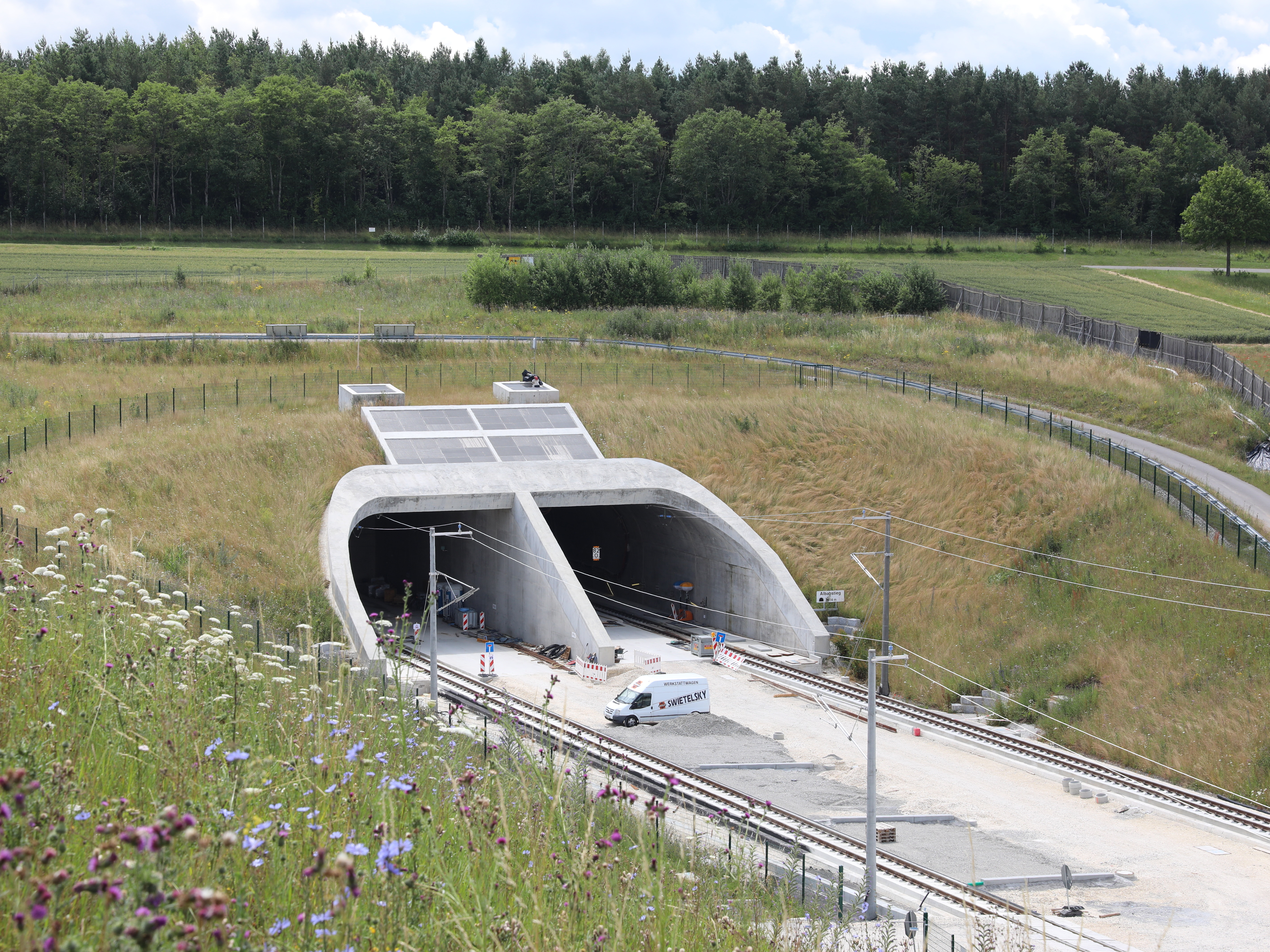 Albabstiegstunnel Westportal bei Dornstadt